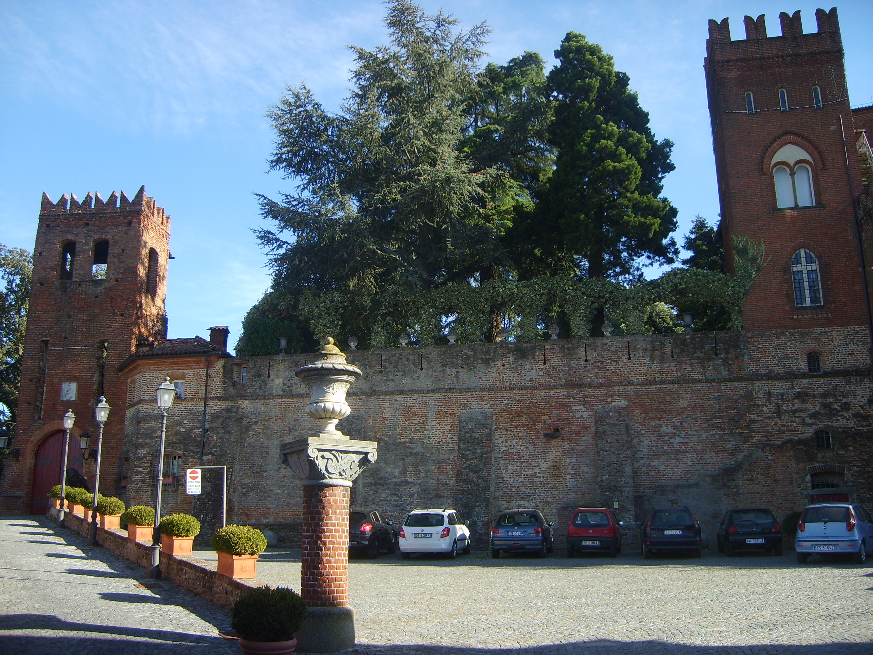 ingresso al castello di Moriondo